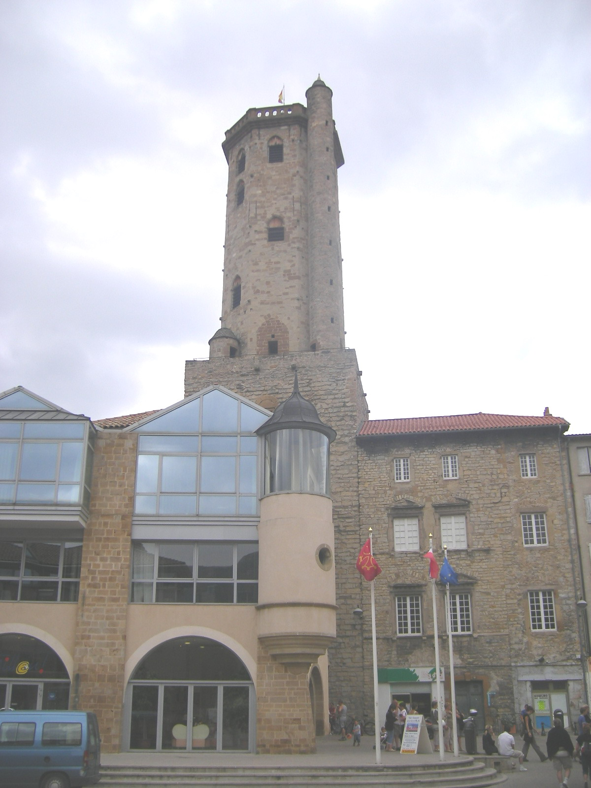 Millau - Beffroi